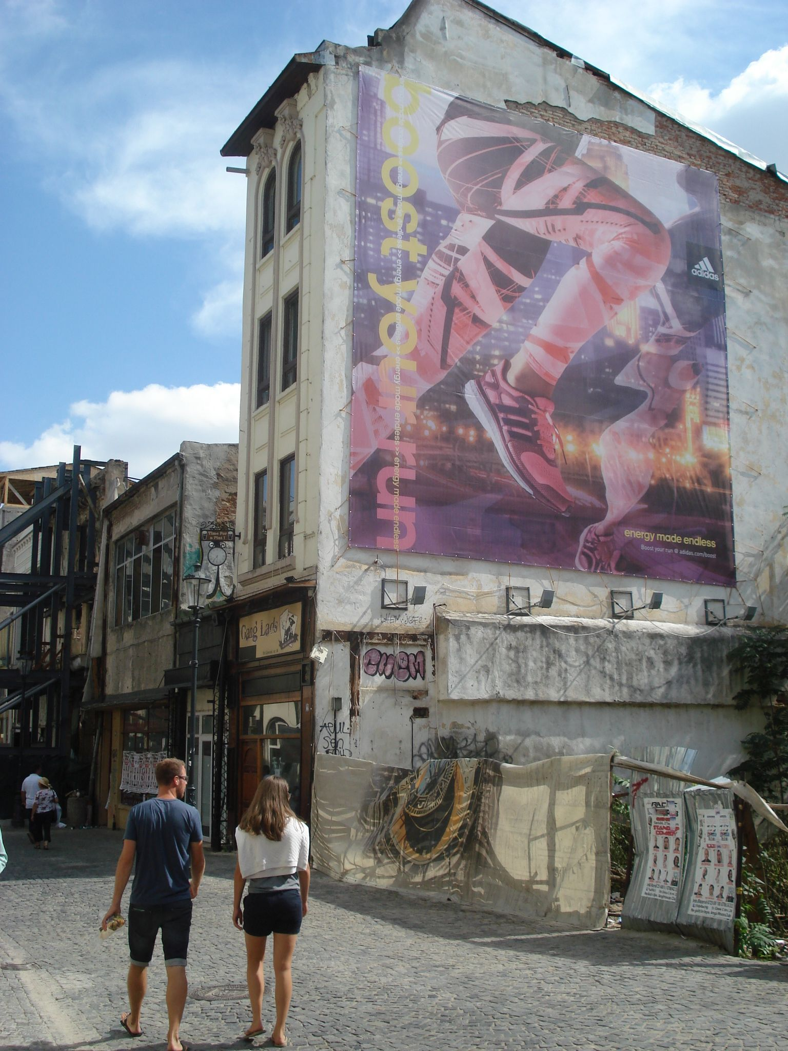 Str. Lipscani nr. 66 (Casă cu prăvălie)